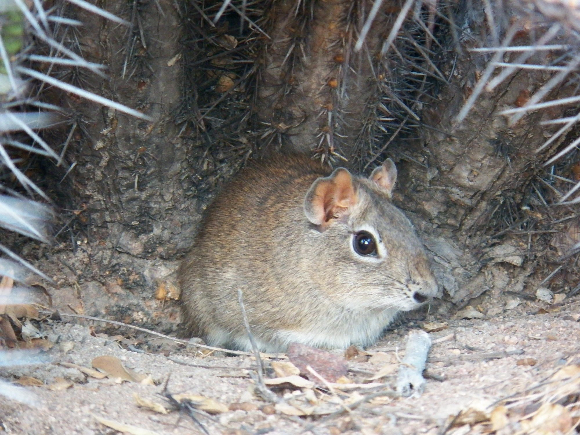 Preá-do-nordeste (galea spixii)